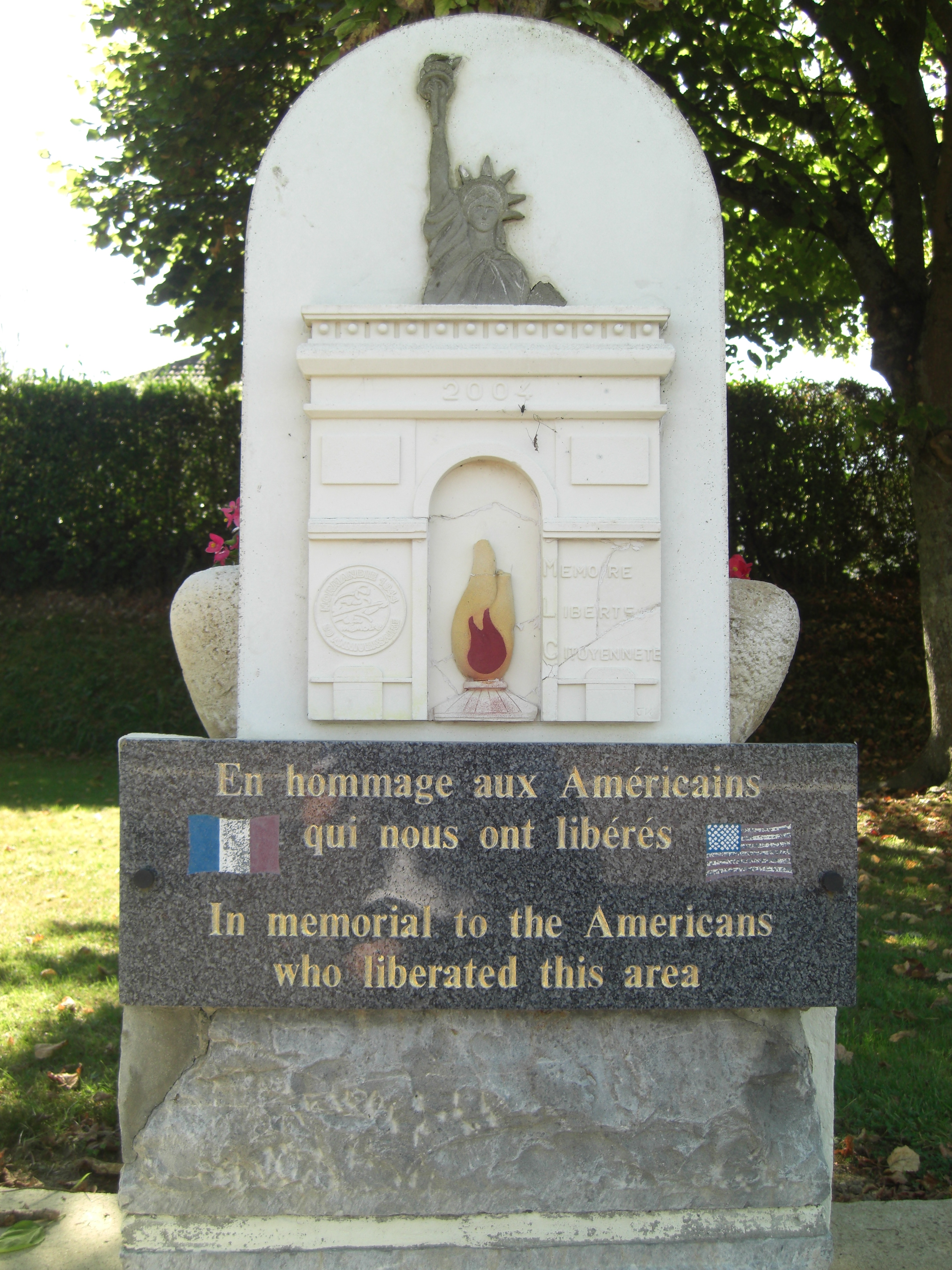 Stèle placé sur la place du village de Montgardon en mémoire des américains qui ont repris aux allemands la crête de Montgardon "Bloody Hill"